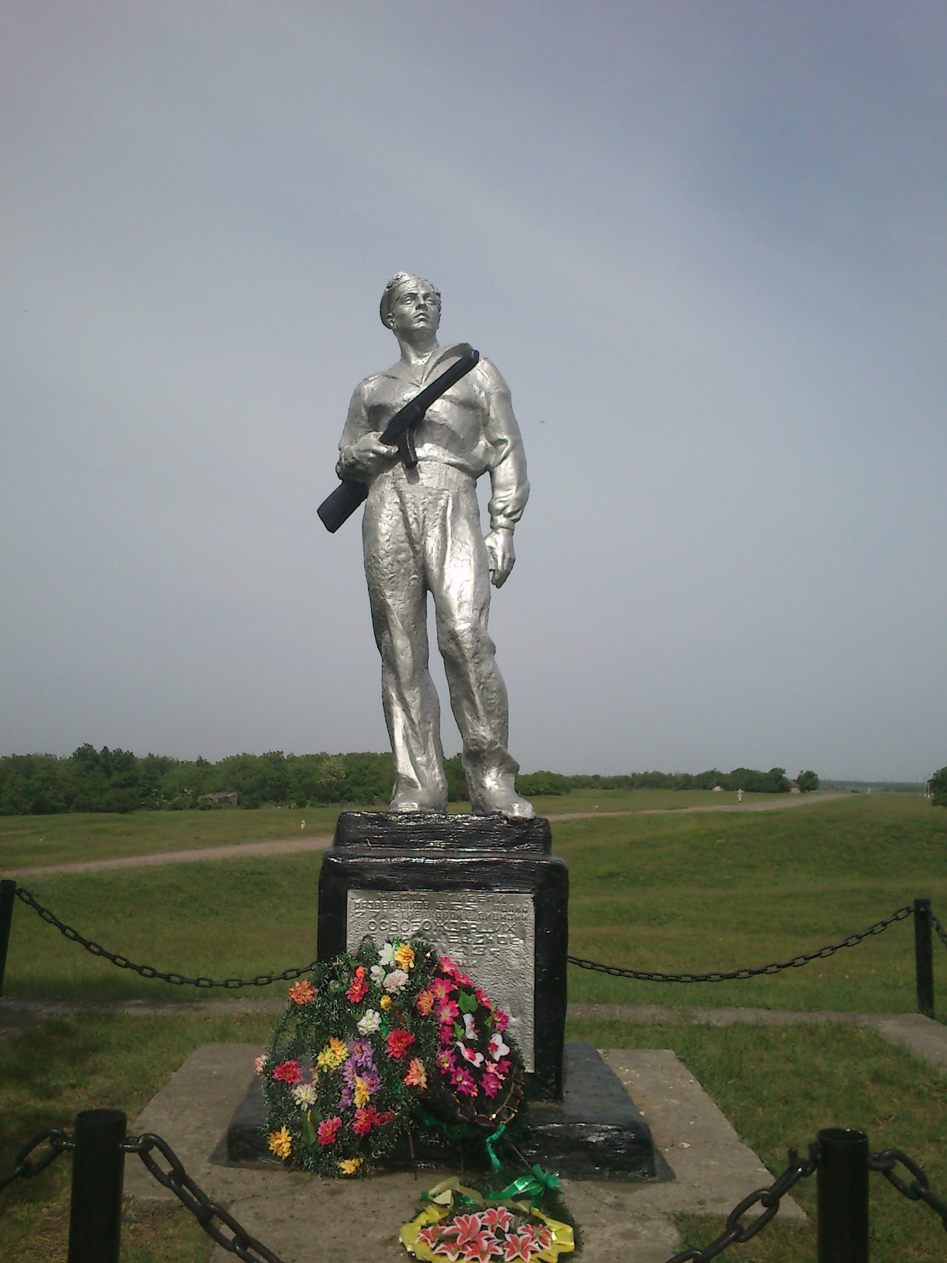 Место гибели разведчиков 865 полка 271 стрелковой дивизии освобождавших село Грушёвское